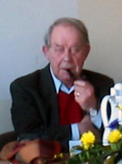 German author Siegfried Lenz